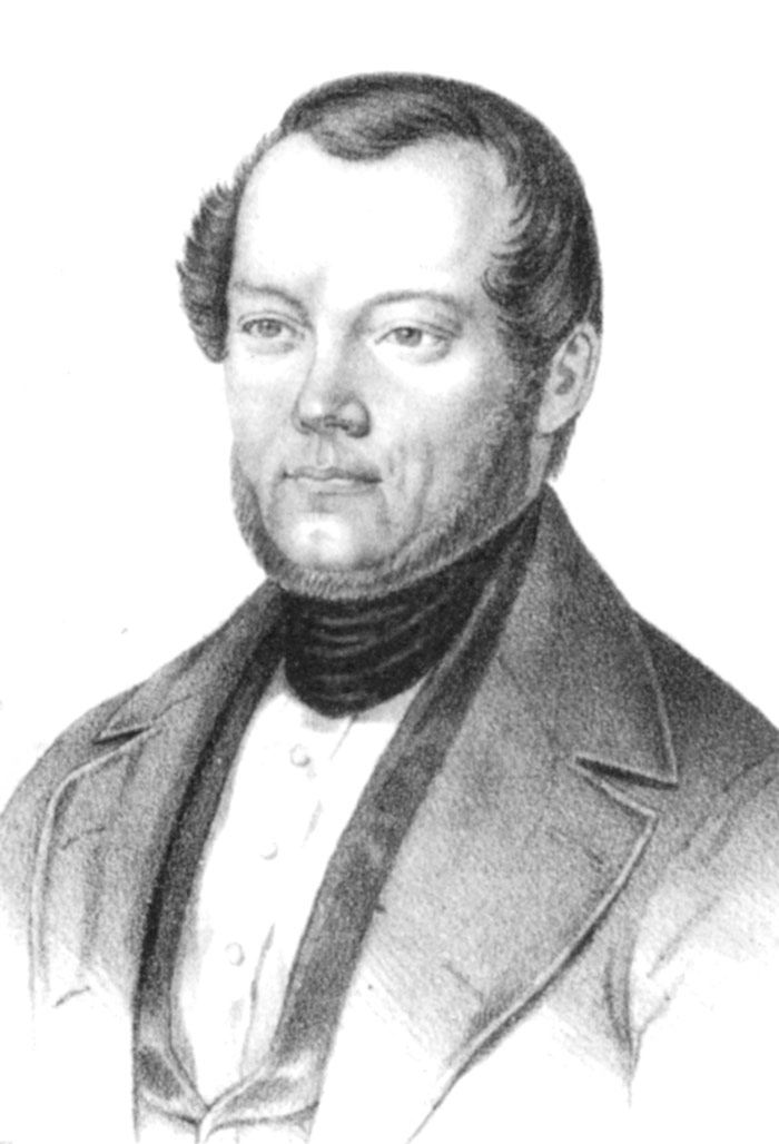 Karl Johann Baptist Junghanns (* 19. November 1797 auf Schloss Stocksberg; † 28. April 1886 in Karlsruhe), badischer Landtagsabgeordneter